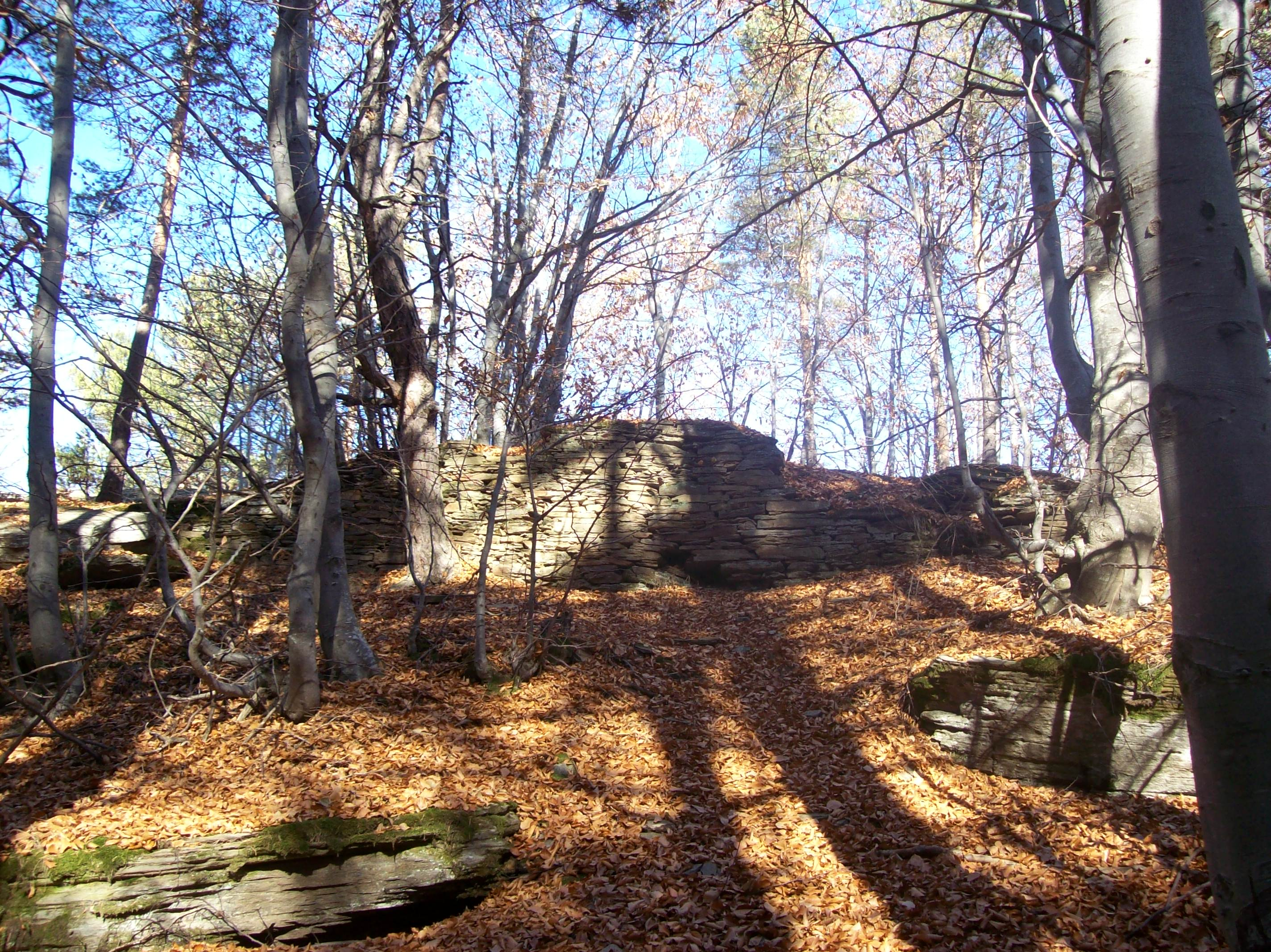 Части от крепостта Свети Дух в покрайнините на Бойково